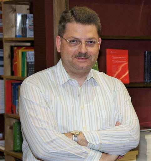 Bei der Buchpremiere vom Buch Von Unterwegs / Nach dem Ziel, am 15. Oktober 2010